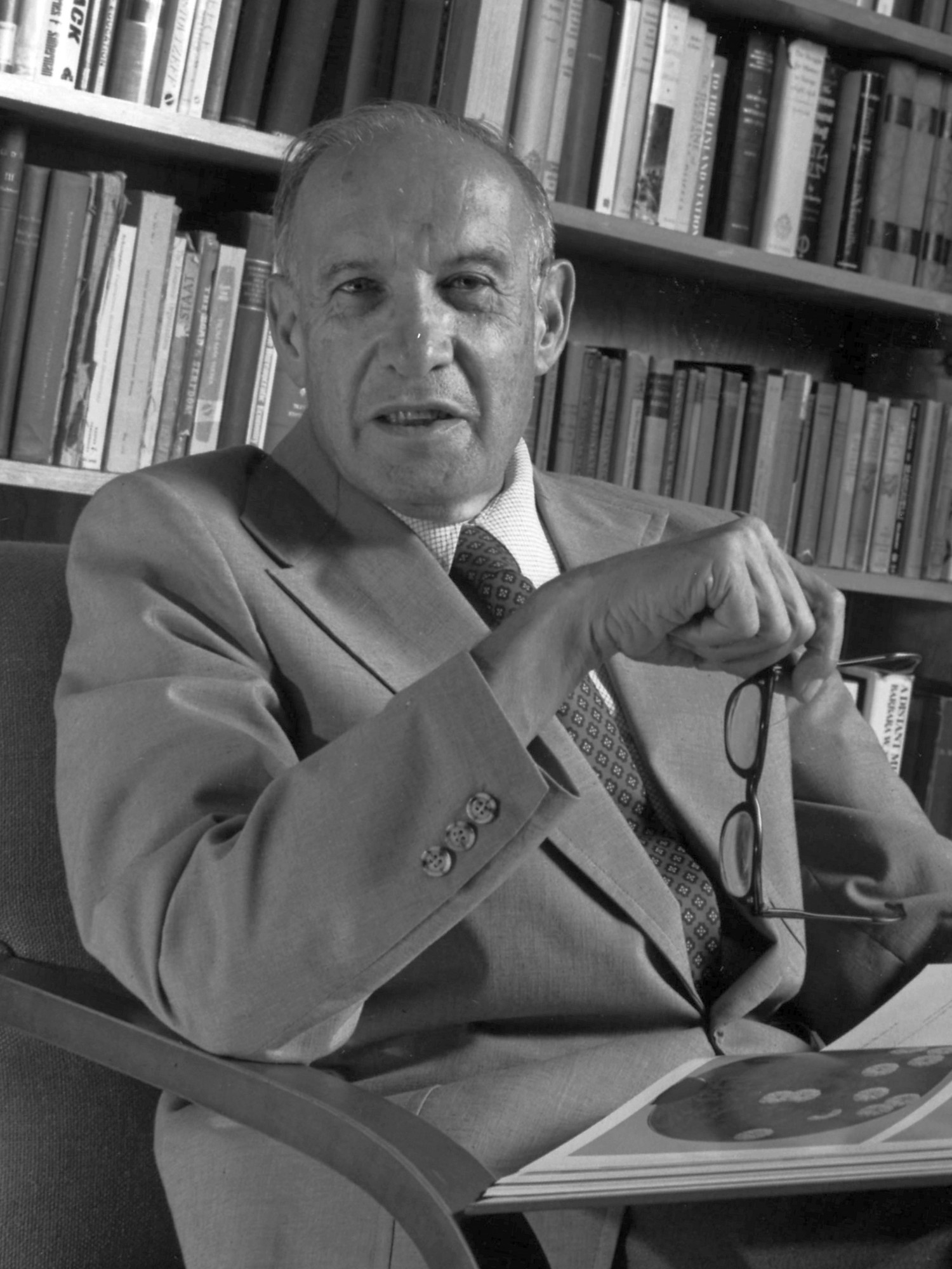 Peter F. Drucker, padre de la administración moderna.